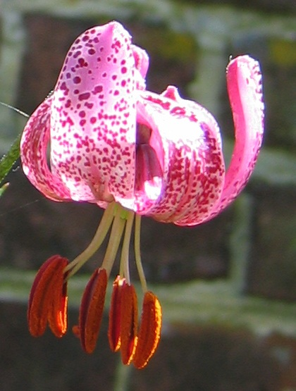 Lilium martagon, 5 juillet 2004, Dieppe